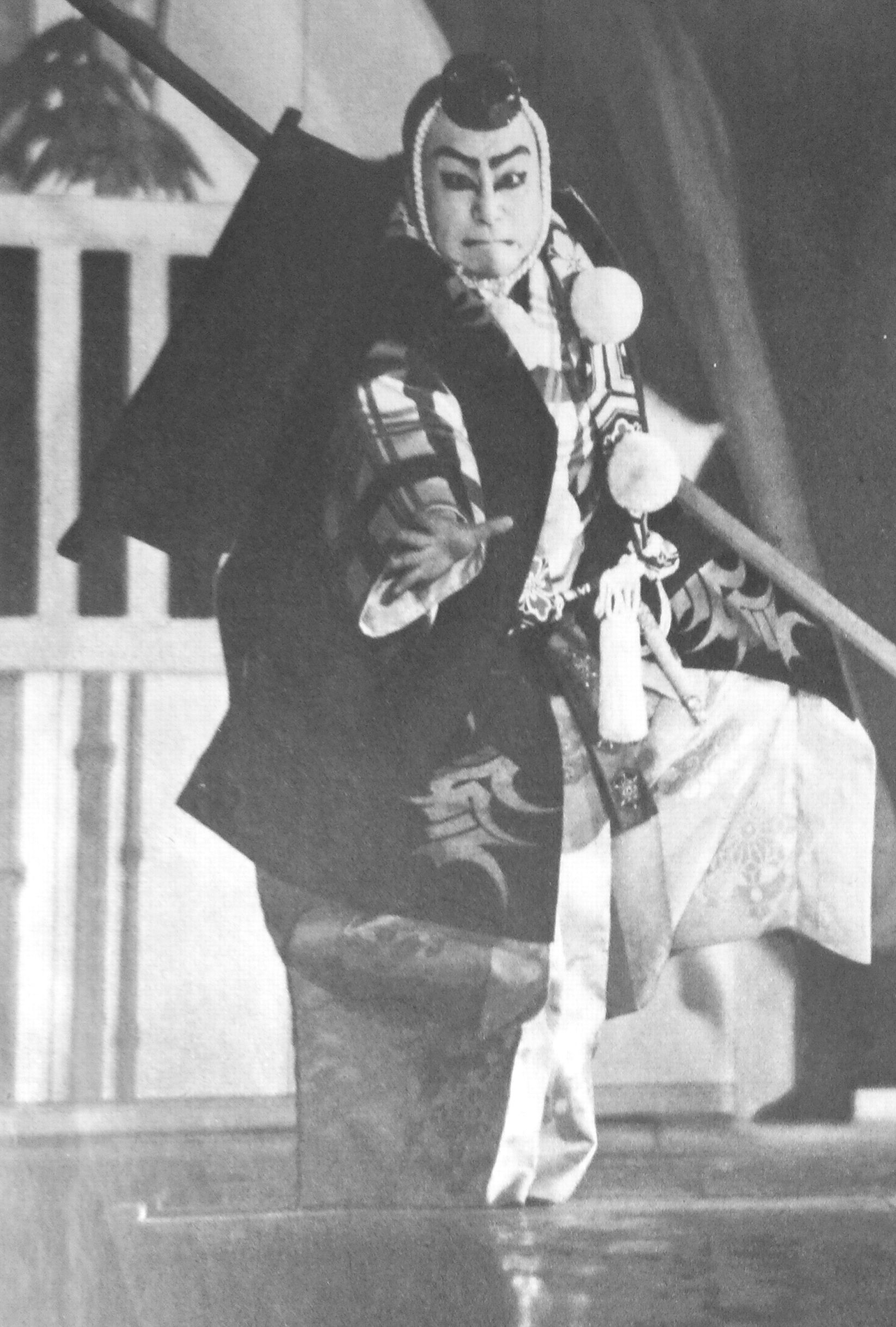 二代目市川猿之助（東京歌舞伎座にて弁慶を演ずる）